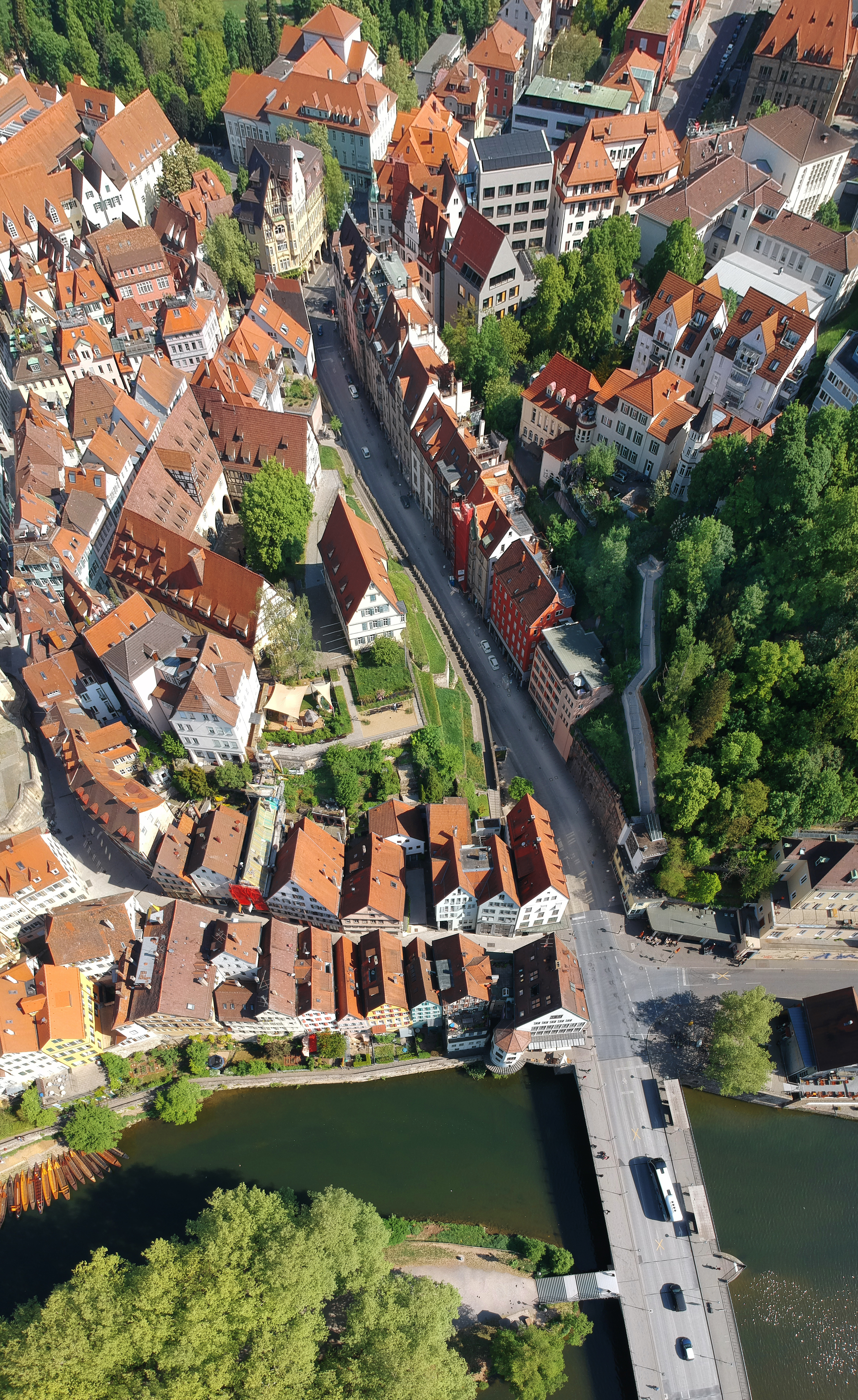 Luftbild der Neckargasse und der Mühlstraße in Tübingen